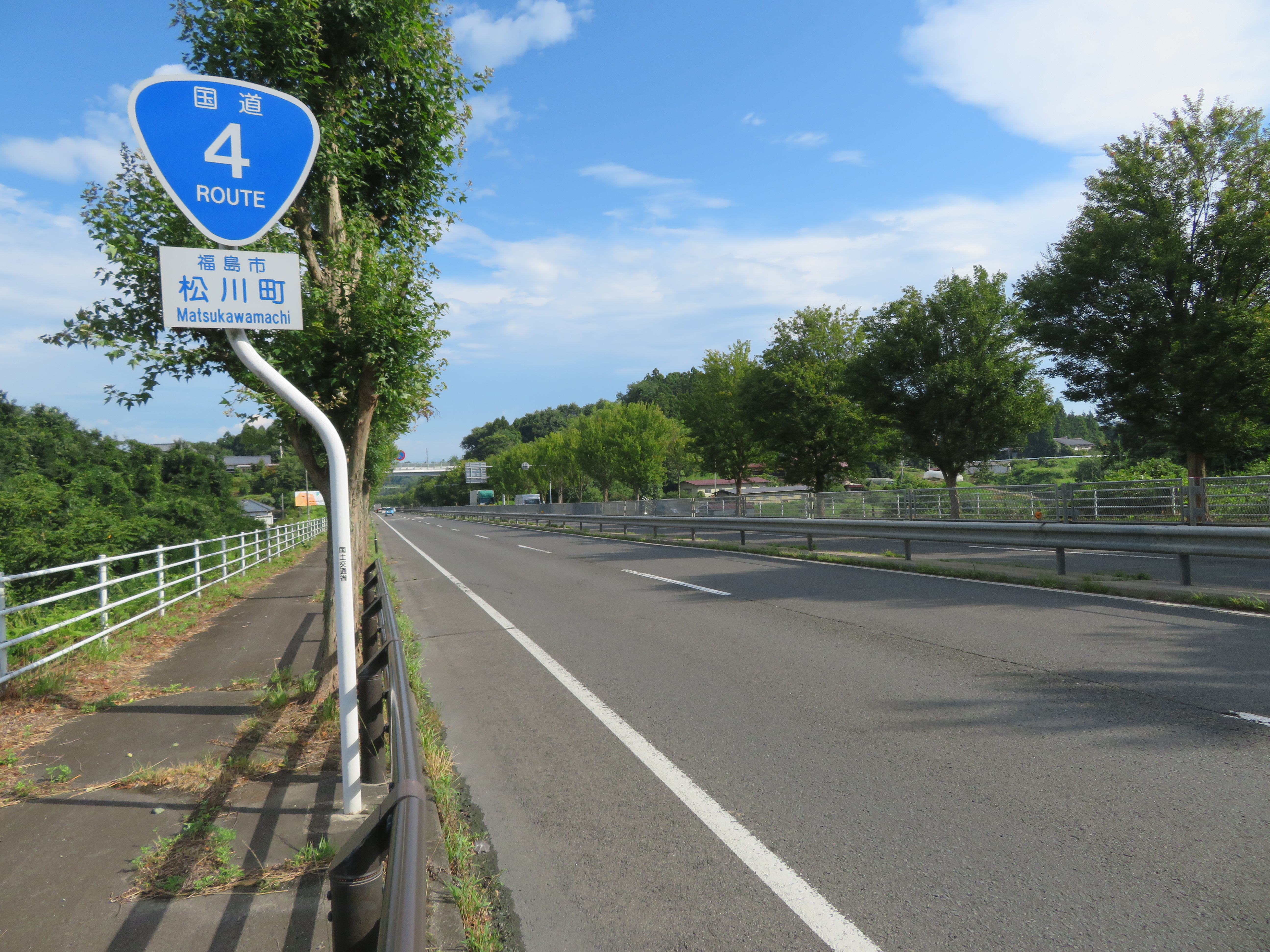 国道4号線福島南バイパス福島県福島市松川町付近（福島市市街地方面を撮影）